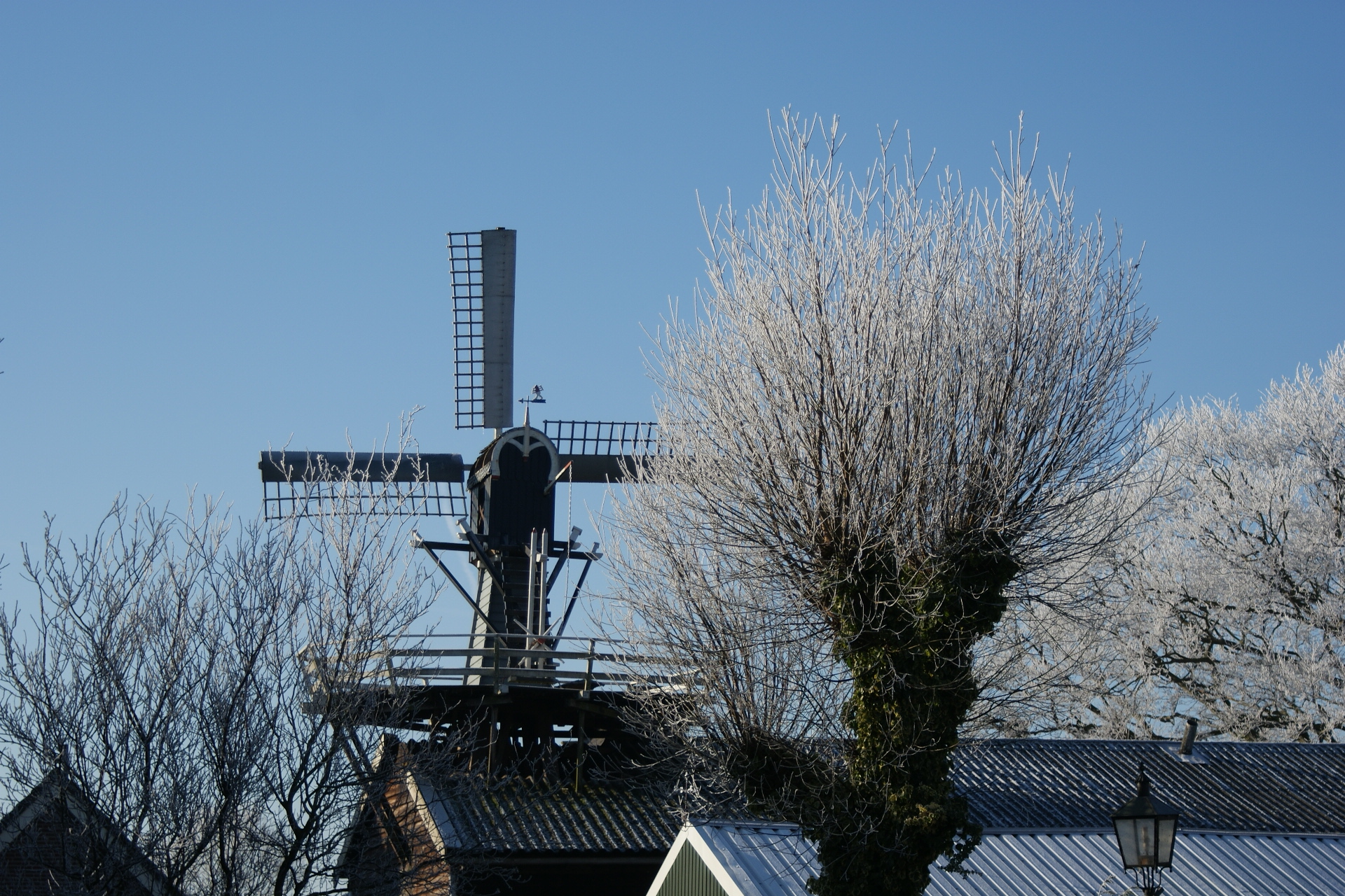 Dekkermolentje in winterse tooi